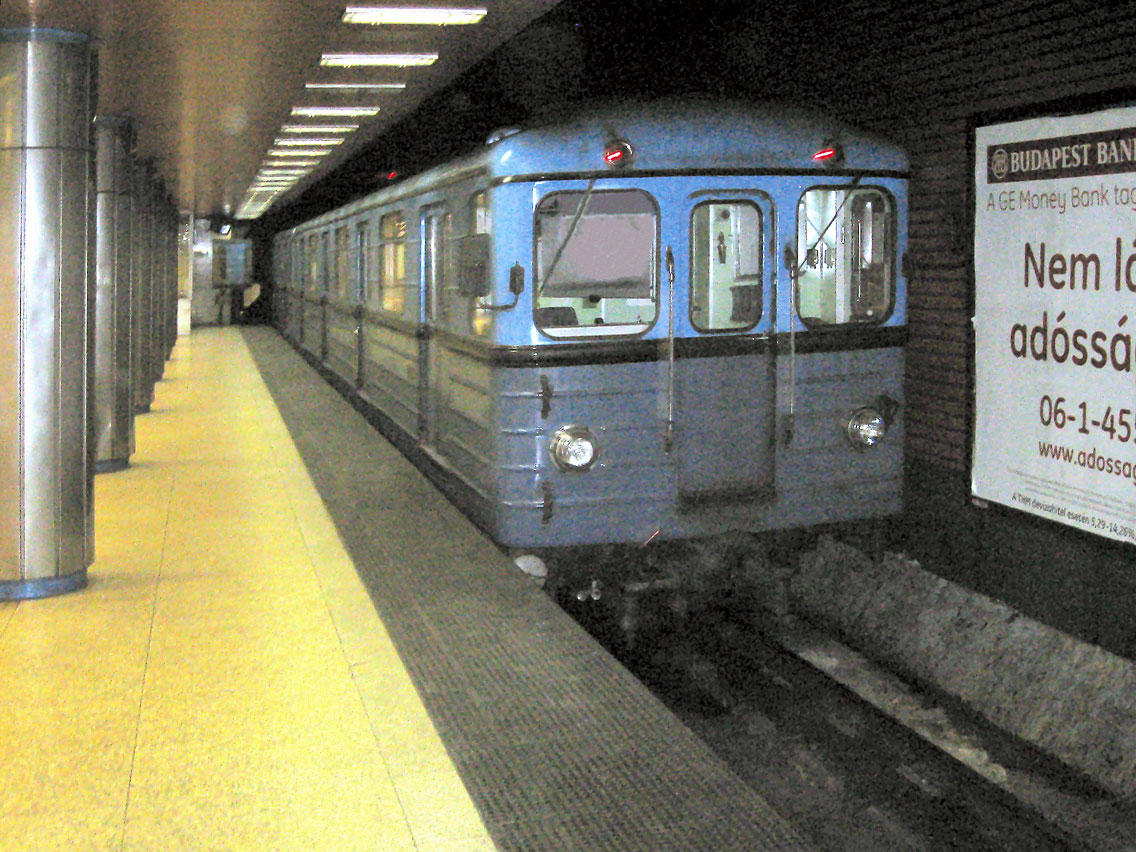 M2 Metro Budapest 01 b